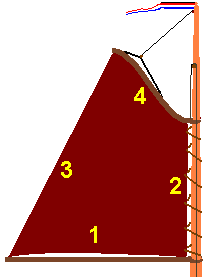 The sides of a sail voorlijk